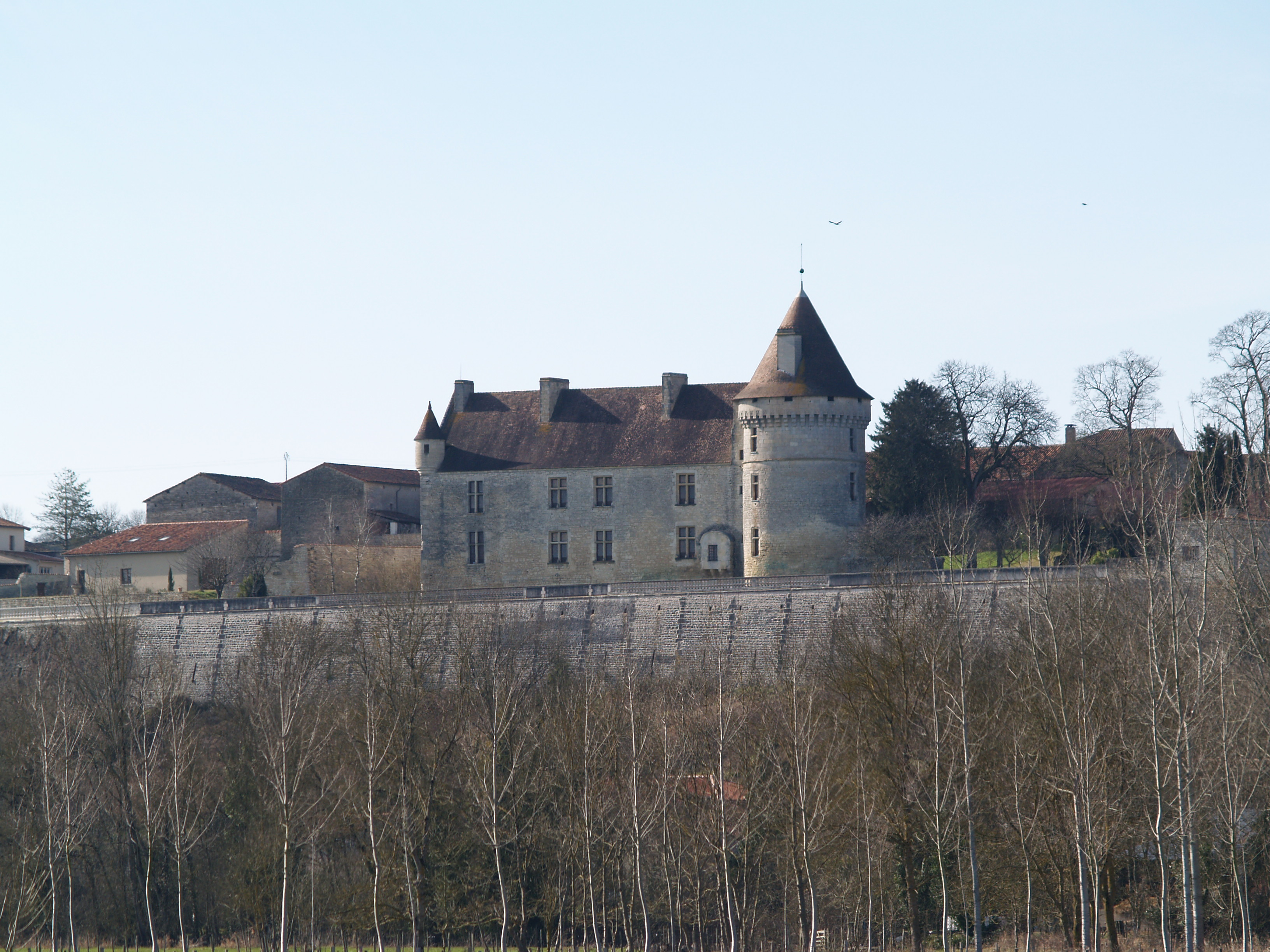 Chateau de Bayers en Charente